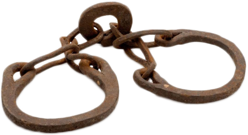 De voetring wordt gebruikt om mensen in het dorp gevangen te zetten. Meestal worden dit type voetringen gebruikt om ze een nacht vast te houden. De gevangene kon hiermee alleen schuifelend vooruitkomen. Indien de banden eenmaal om de voeten waren bevestigd kon slechts de smid ze weer losmaken.